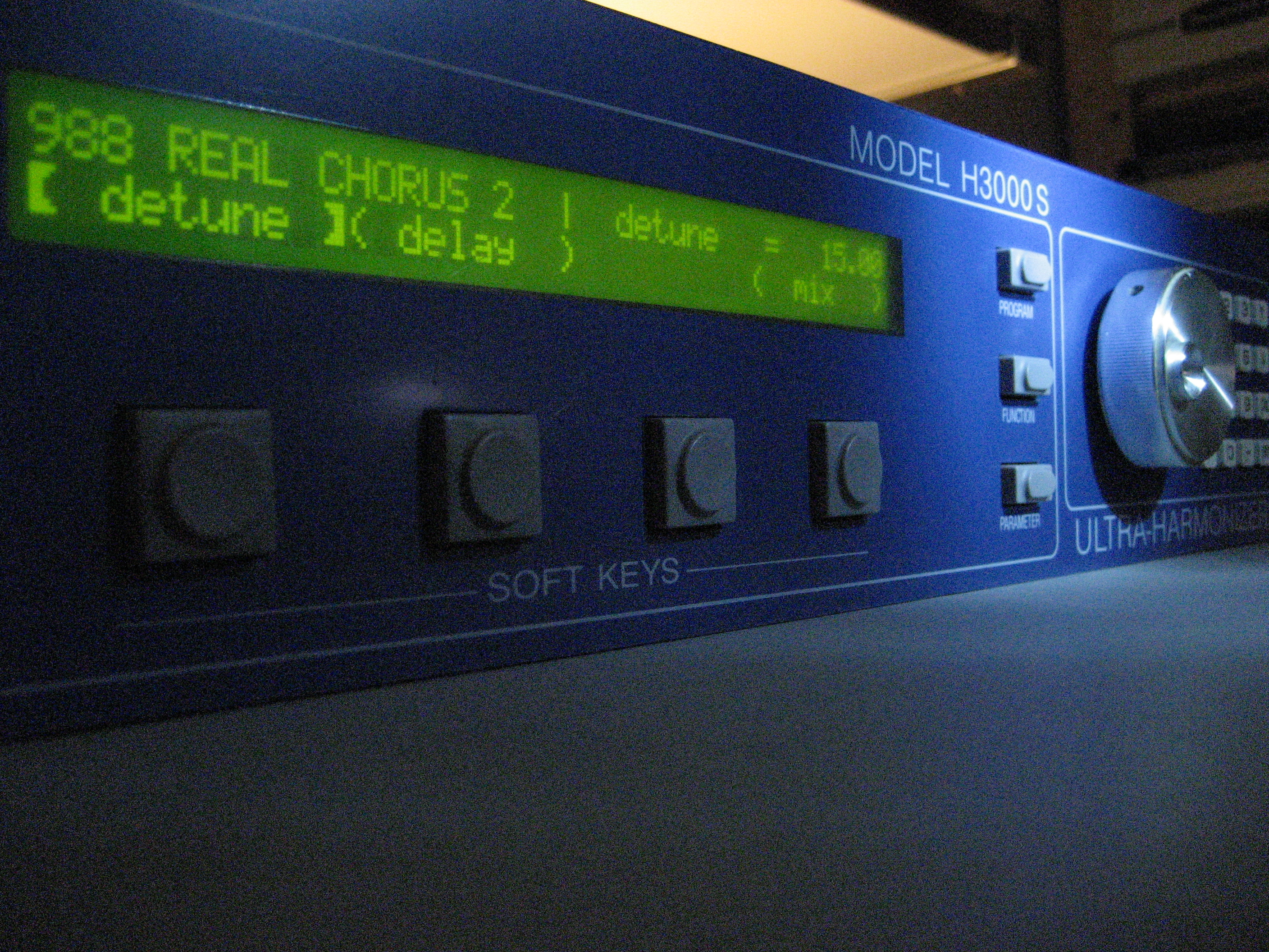 Eventide H3000 SE Ultra-Harmonizer (Serial No. S4704)